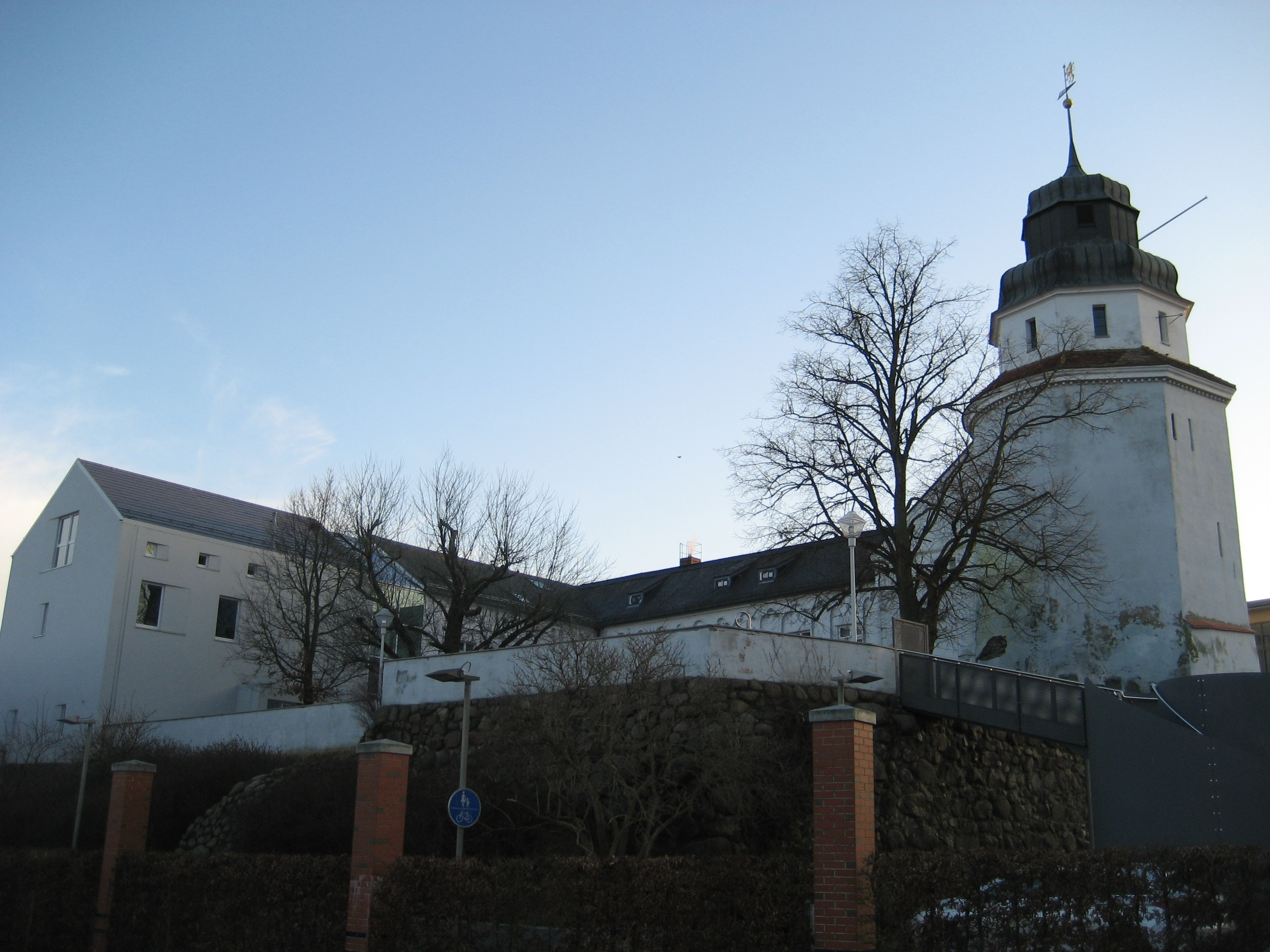 Schloss Ueckermünde aus Blickrichtung Schulstraße.